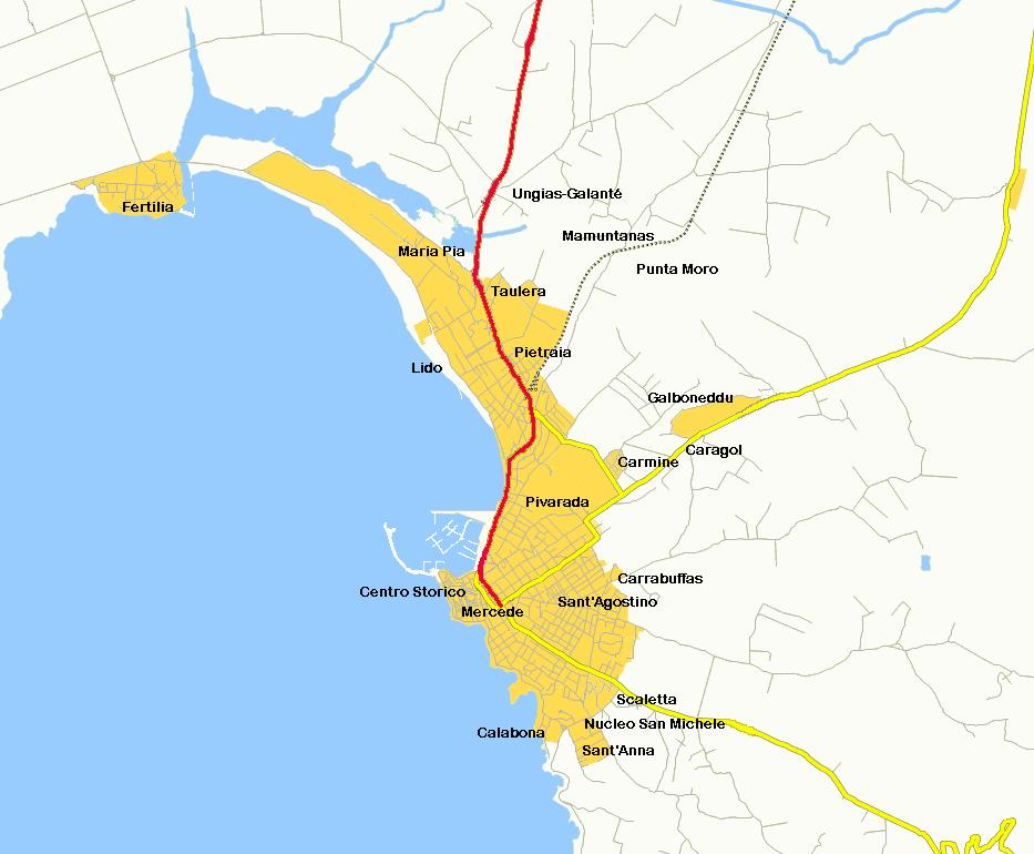 Mapka Mjaso alguer